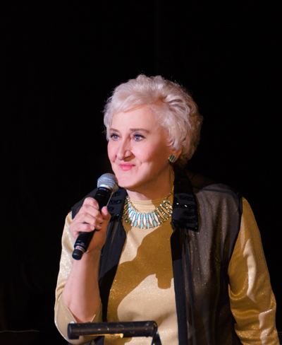 Dr. Doris M. Brougham.